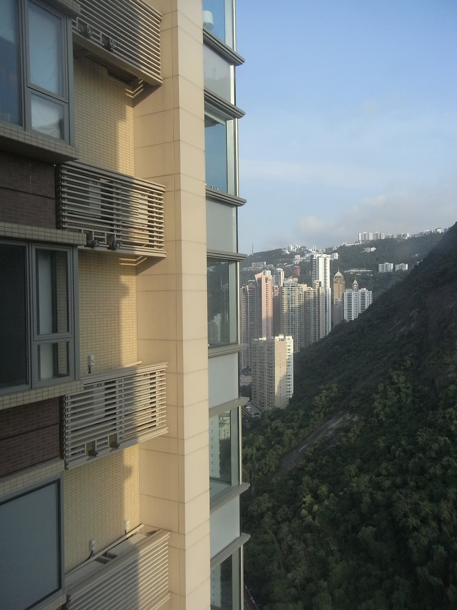 中文（香港）: 香港島西半山區干德道39號zh:住宅zh:摩天大廈恆基兆業地產zh:豪宅天匯外望景觀